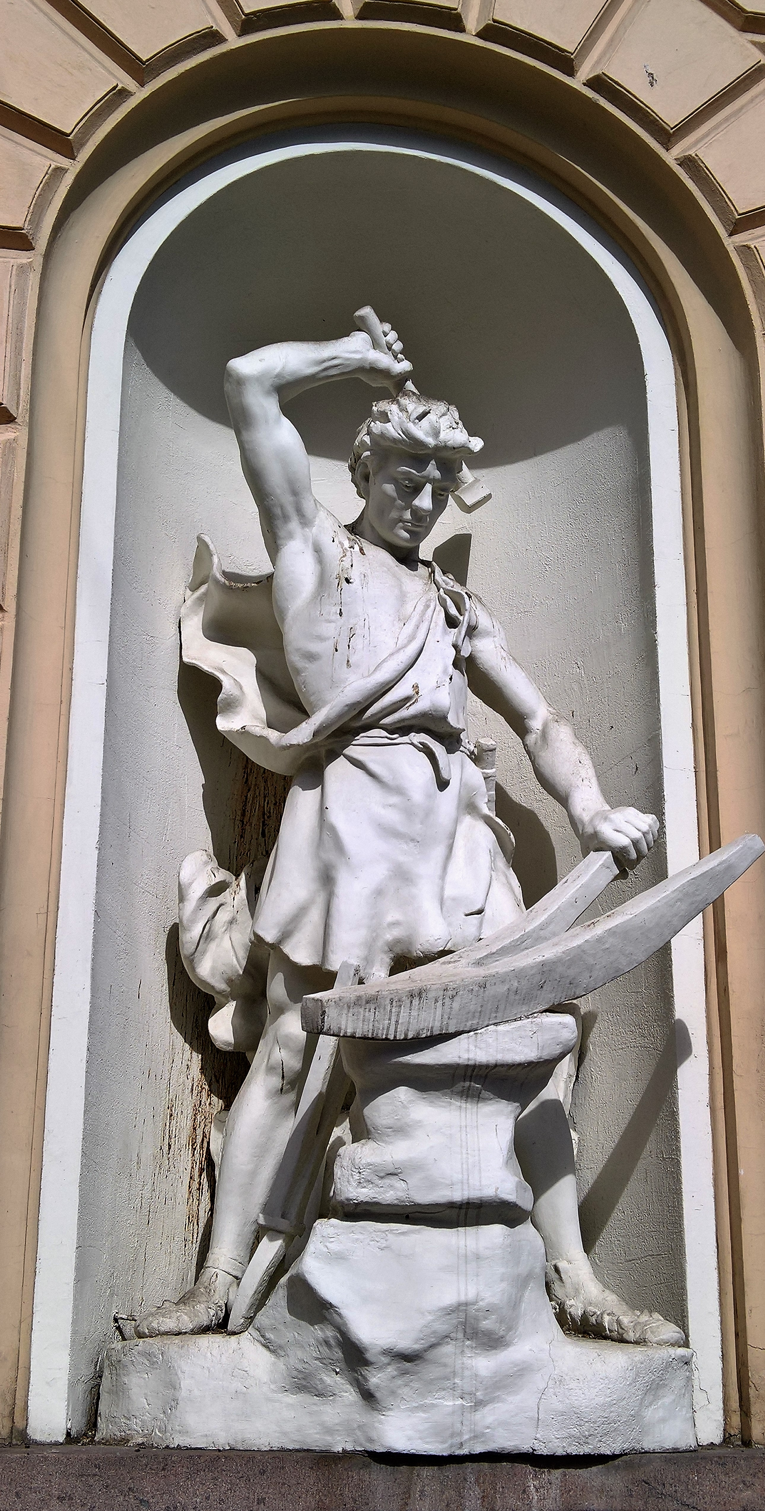 Kuva Robert Stigellin veistoksesta Ilmarinen Helsingin Vanhan ylioppilastalon pääoven vieressä vasemmalla.